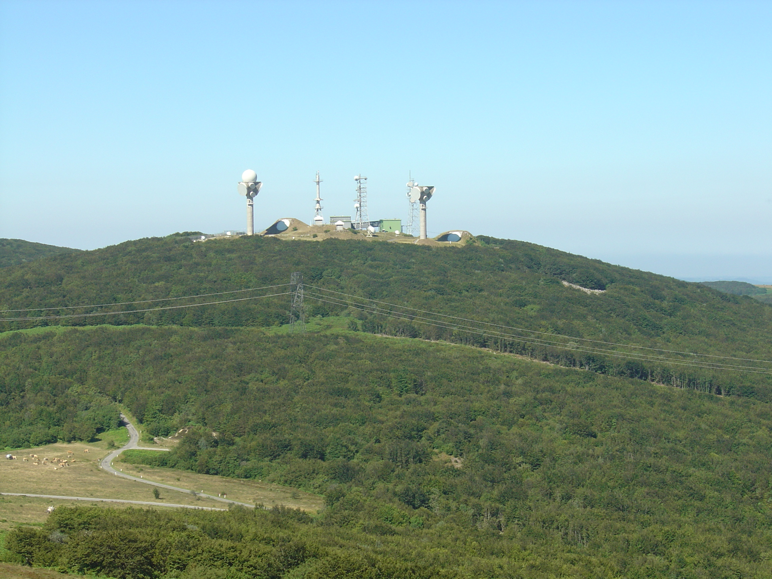 Lacaune (Tarn) - Le Puech de Rascas (altitude 1264 m) et ses antennes vu depuis le roc de Montalet